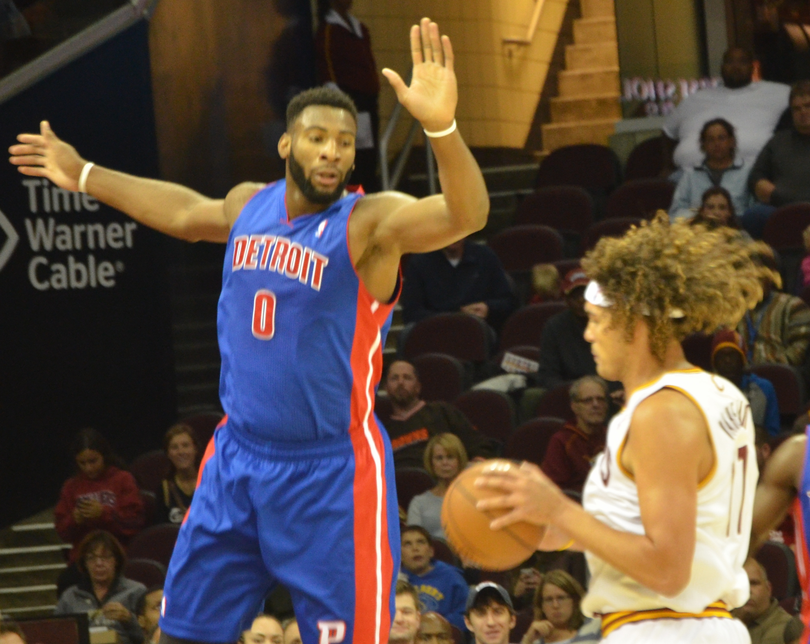 Pistons vs Cavs